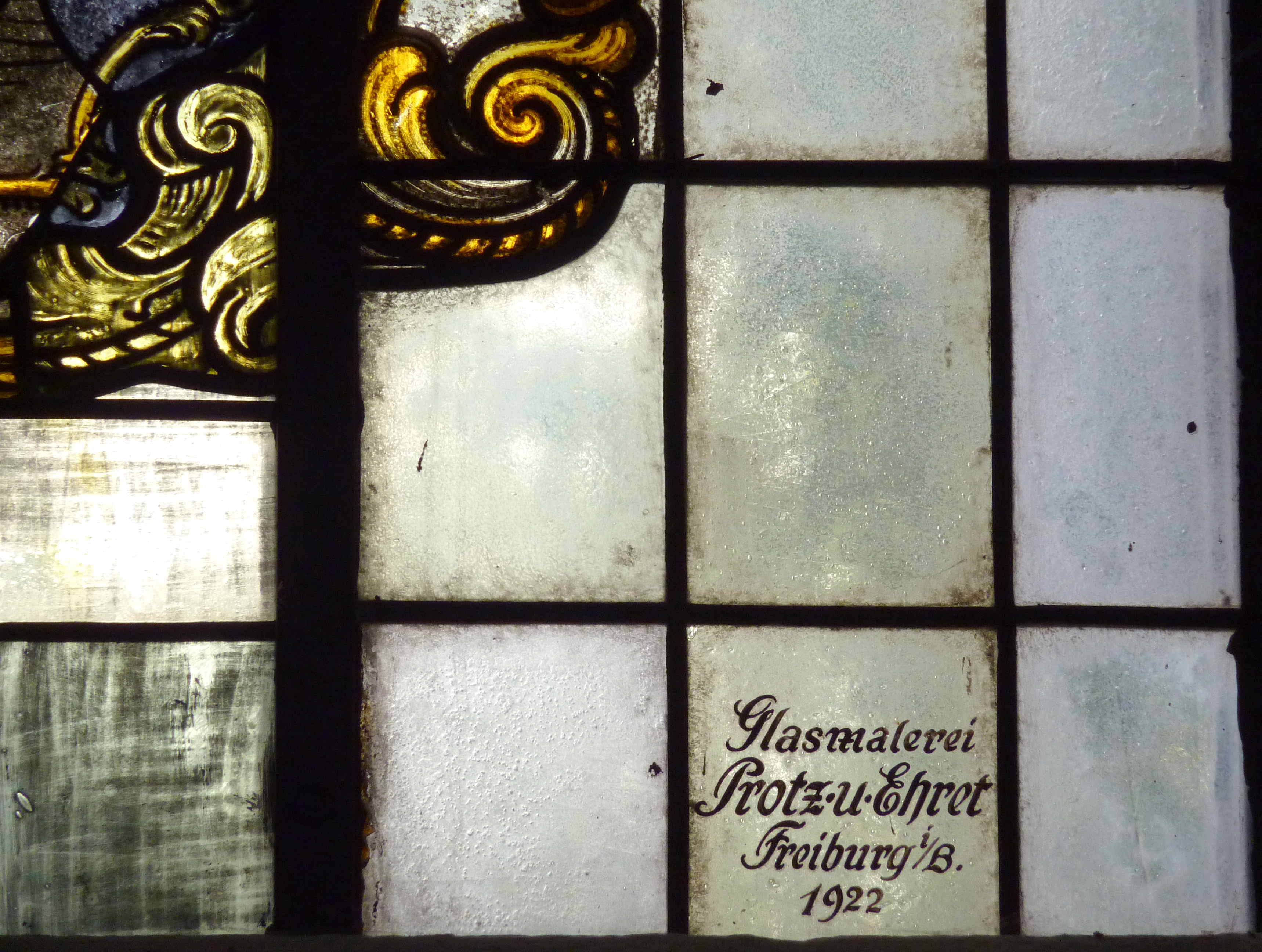 Katholische Pfarrkirche St. Gordian und Epimachus in Watterdingen, einem Stadtteil von Tengen im Landkreis Konstanz (Baden-Württemberg/Deutschland), Bleiglasfenster (Madonna mit Kind auf der Mondsichel) mit der Signatur: Glasmalerei Protz u. Ehret Freiburg i. B. 1922 (Ausschnitt)